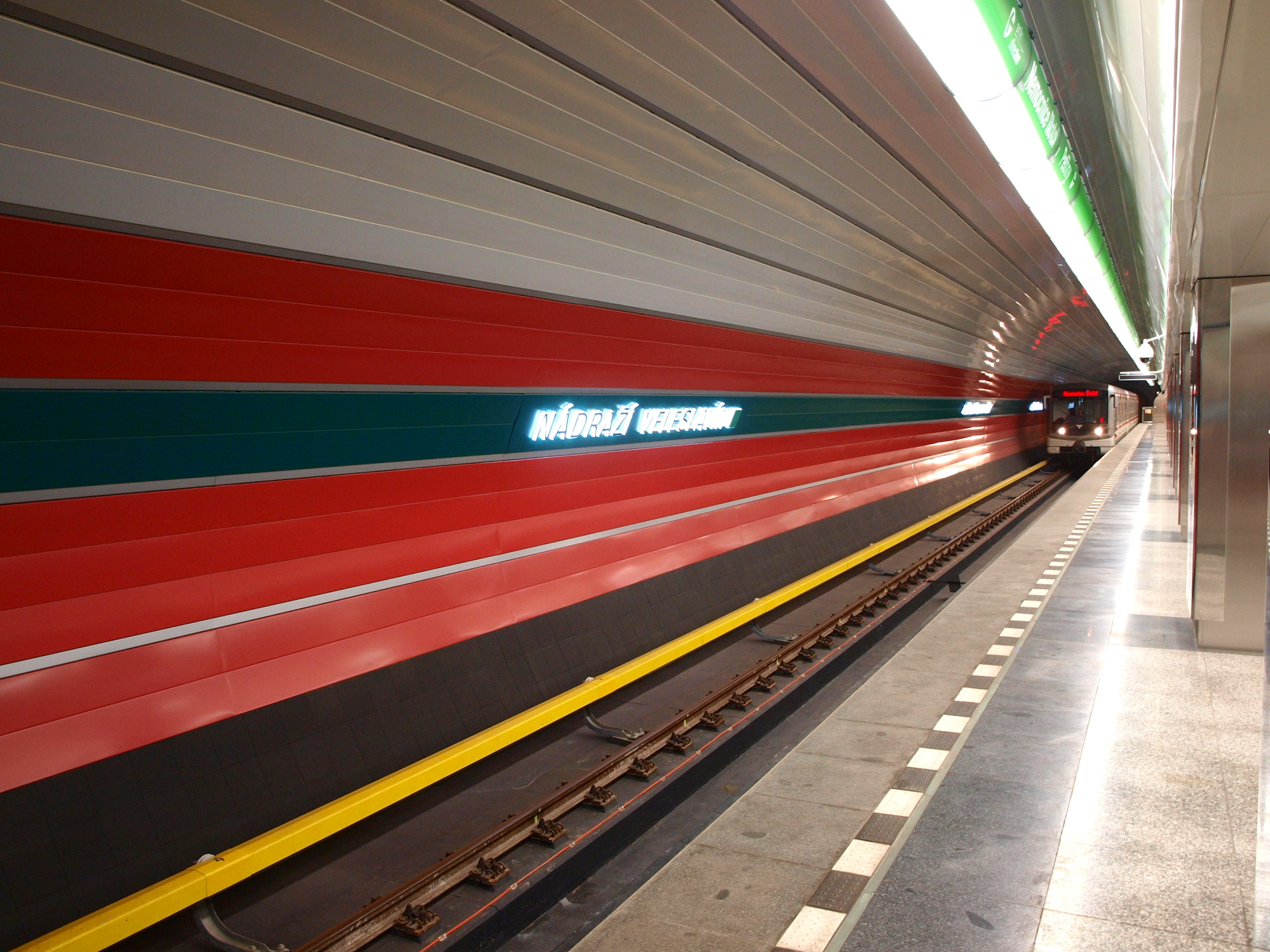 Satnice Nádraží Veleslavín